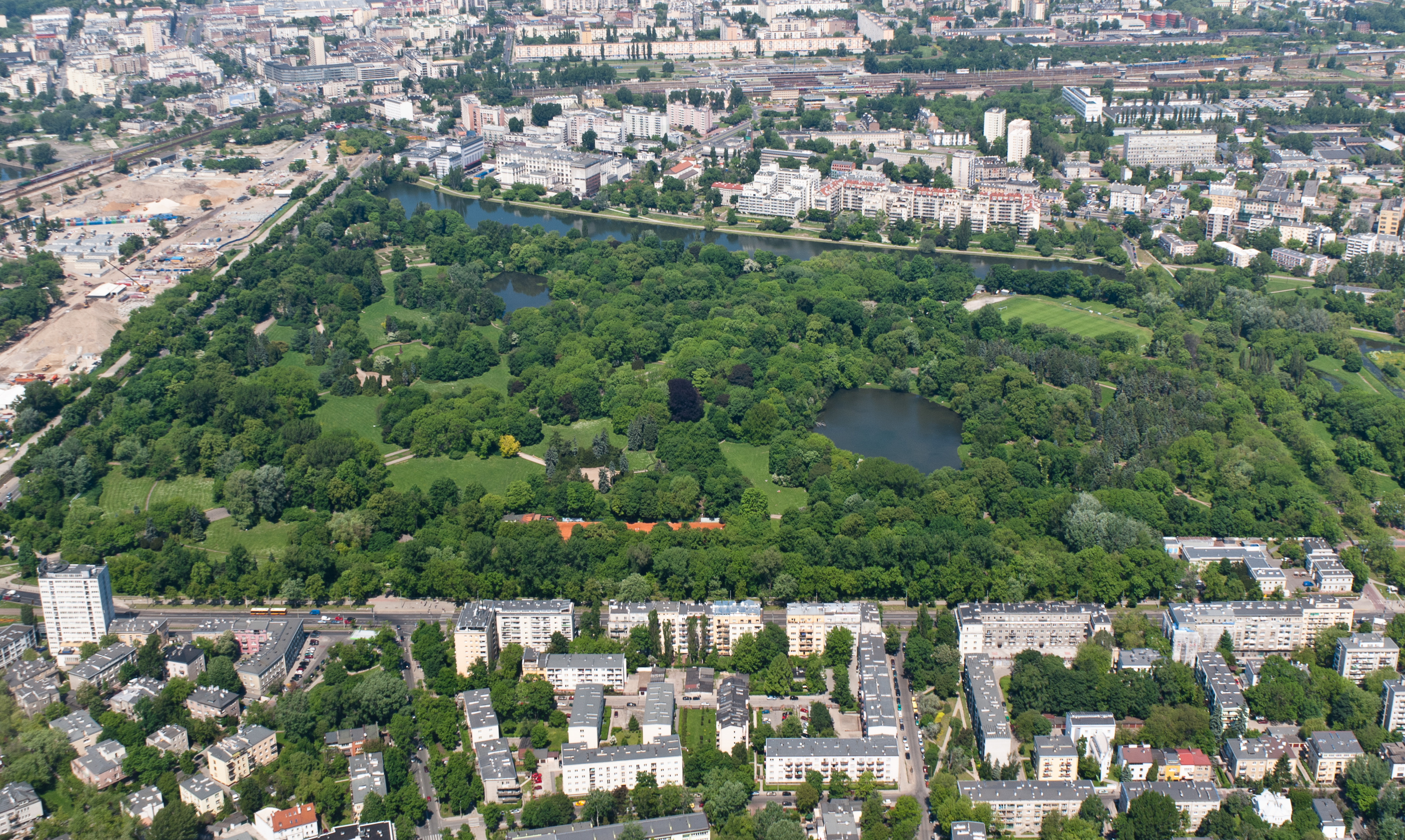 Park Skaryszewski w Warszawie, widok od strony południowej - zdjęcie lotnicze.